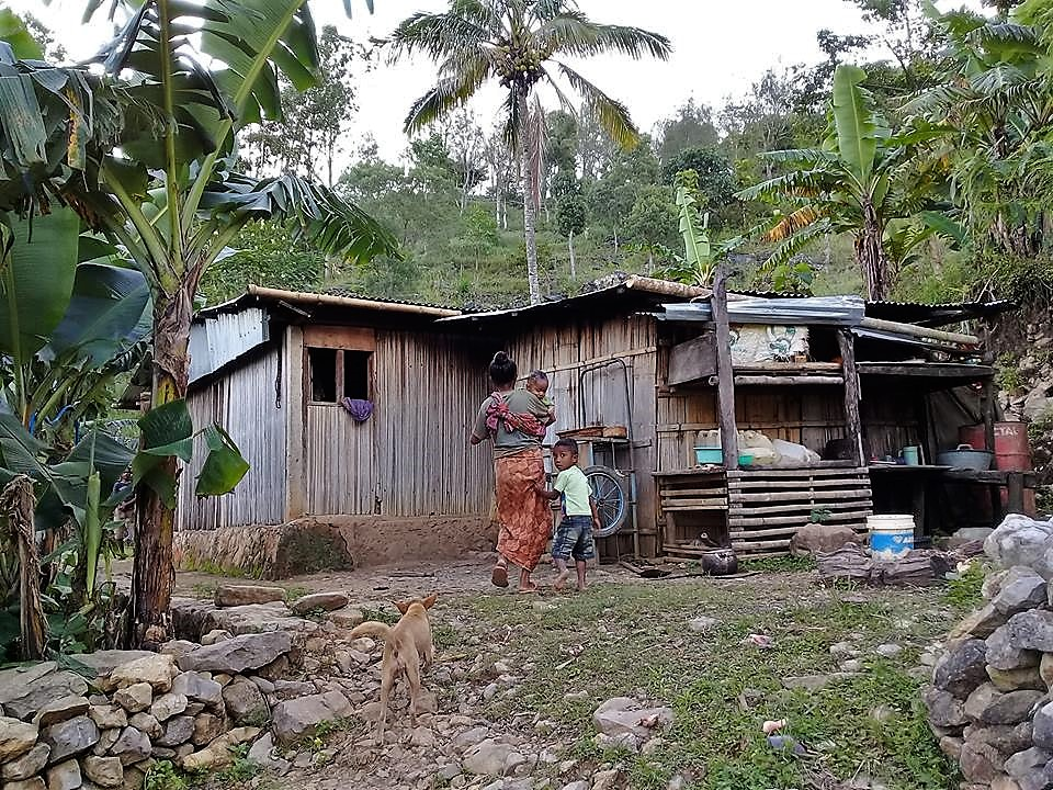 Obulo, Atsabe, Ermera, Osttimor